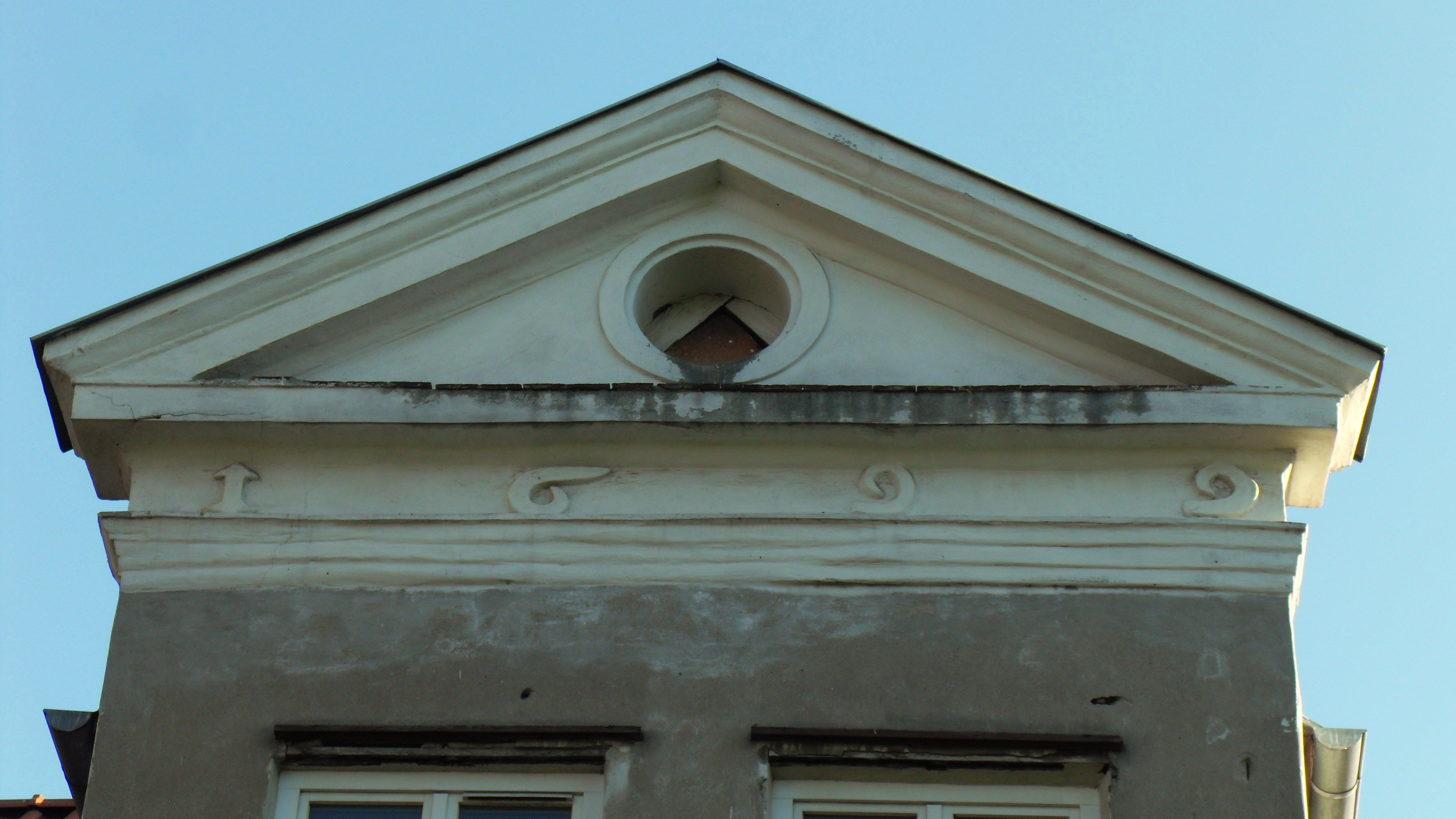 Gdańsk Osiek, ul. Sieroca 6 (tył). 1699, rok ukończenia budowy.